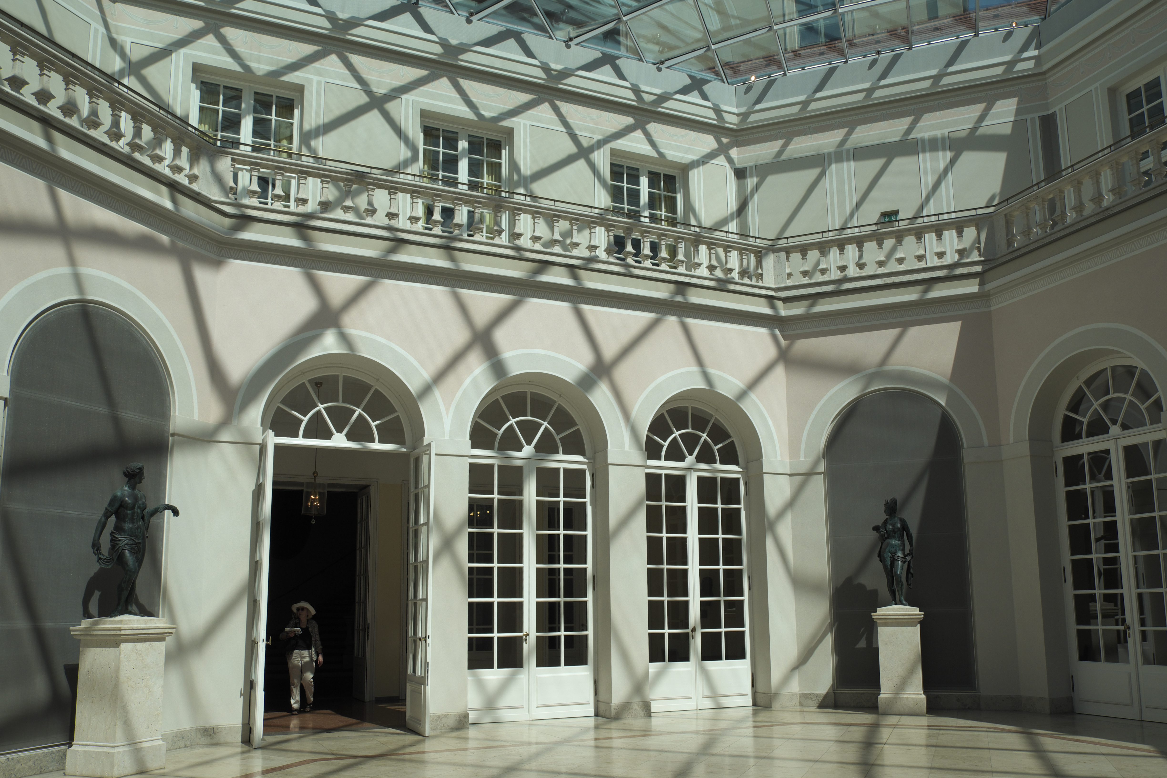 Cuvilliés-Theater in der Münchner Altstadt im Stadtbezirk Altstadt-Lehel (Bayern/Deutschland)